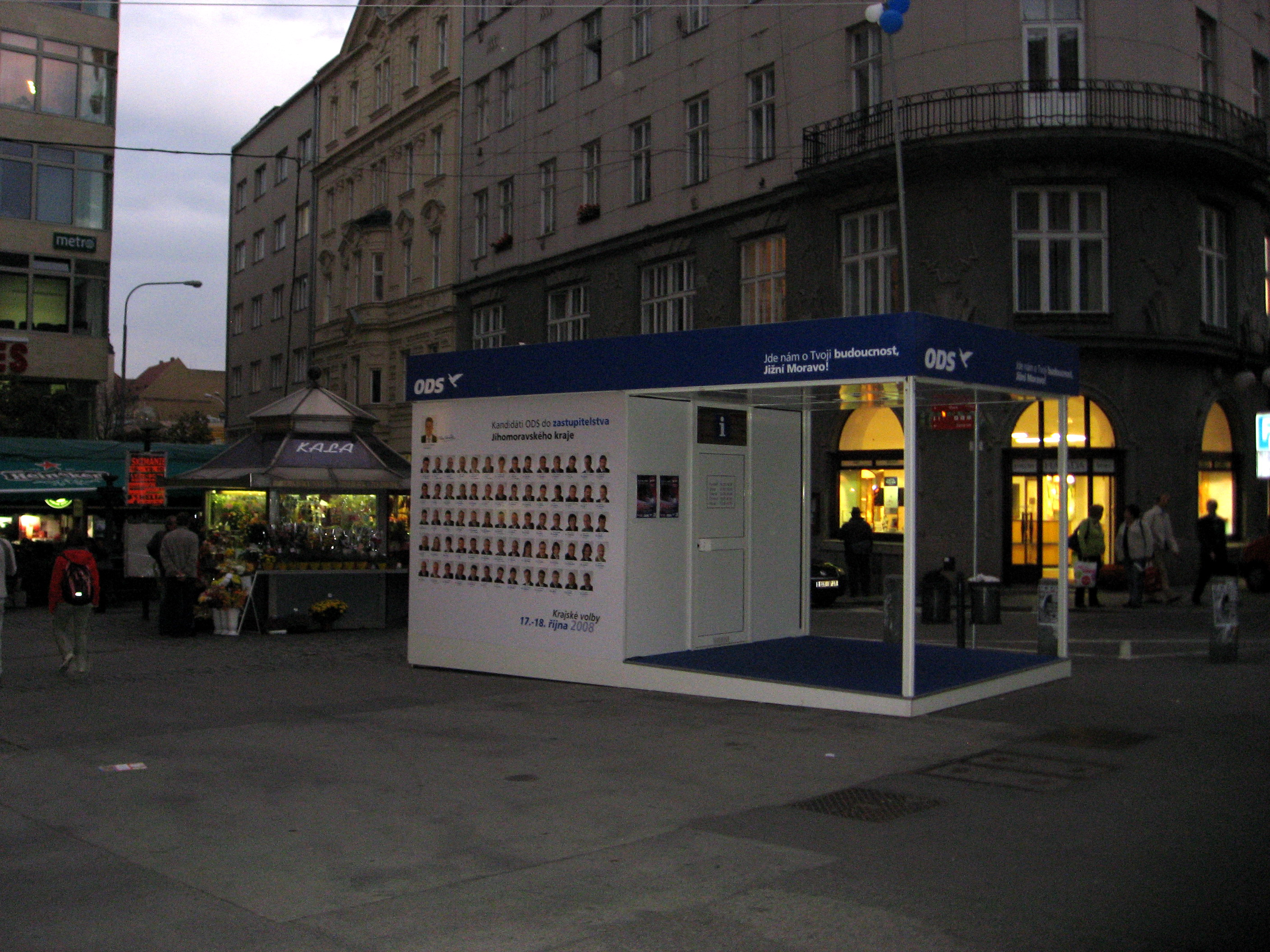 Propagační stánek ODS v Brně